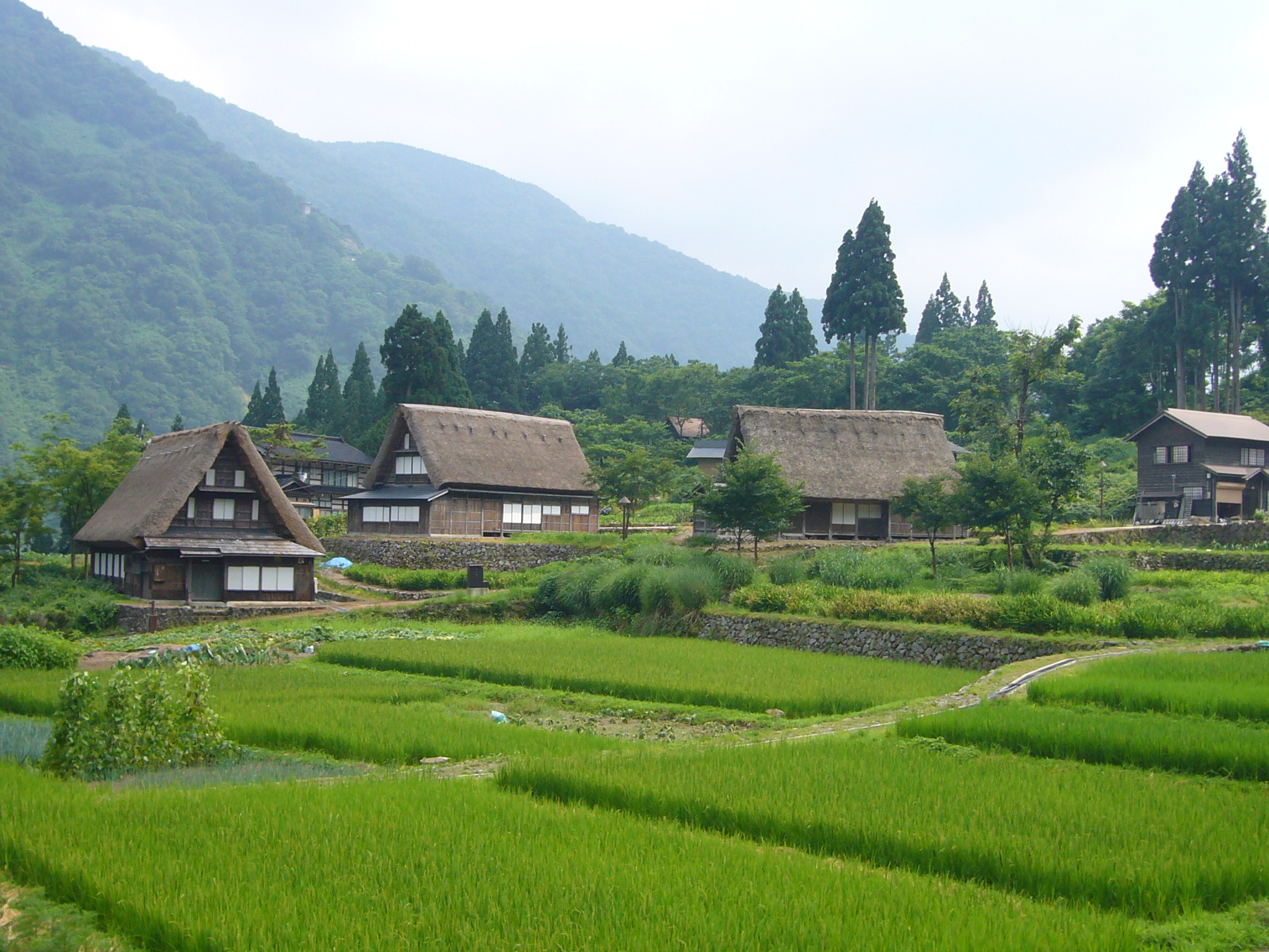 富山県南砺市（旧平村） 越中五箇山 相倉合掌集落